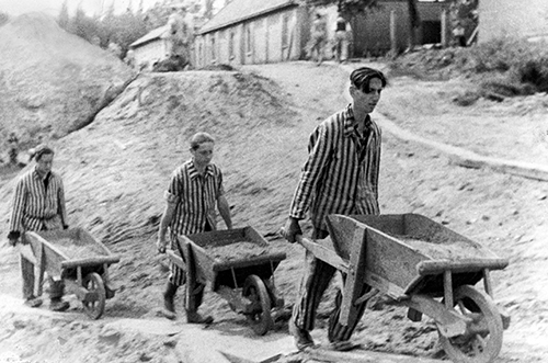 Foto juli 1943 in Amersfoort genomen. Op 17 mei 1943 wordt een groep van ruim zeventig Joodse mannen uit kamp Vught naar kamp Amersfoort overgebracht voor graafwerkzaamheden bij de Infanteriekazerne. Ze worden streng gescheiden gehouden van de al snel weer binnenkomende gevangenen in Amersfoort, dragen gevangenenkleding, blijven administratief onder Vught vallen, en krijgen post en pakketten vanuit Vught doorgestuurd. Na zeven weken is het graven aan de pantserschietbaan klaar en gaan de mannen terug naar Vught. Hun vrouwen en kinderen zijn dan al weg met de kindertransporten. NIOD 65987